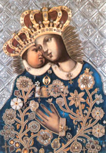 Matka Boska kalwaryjskalabel QS:Lpl,"Matka Boska kalwaryjska"